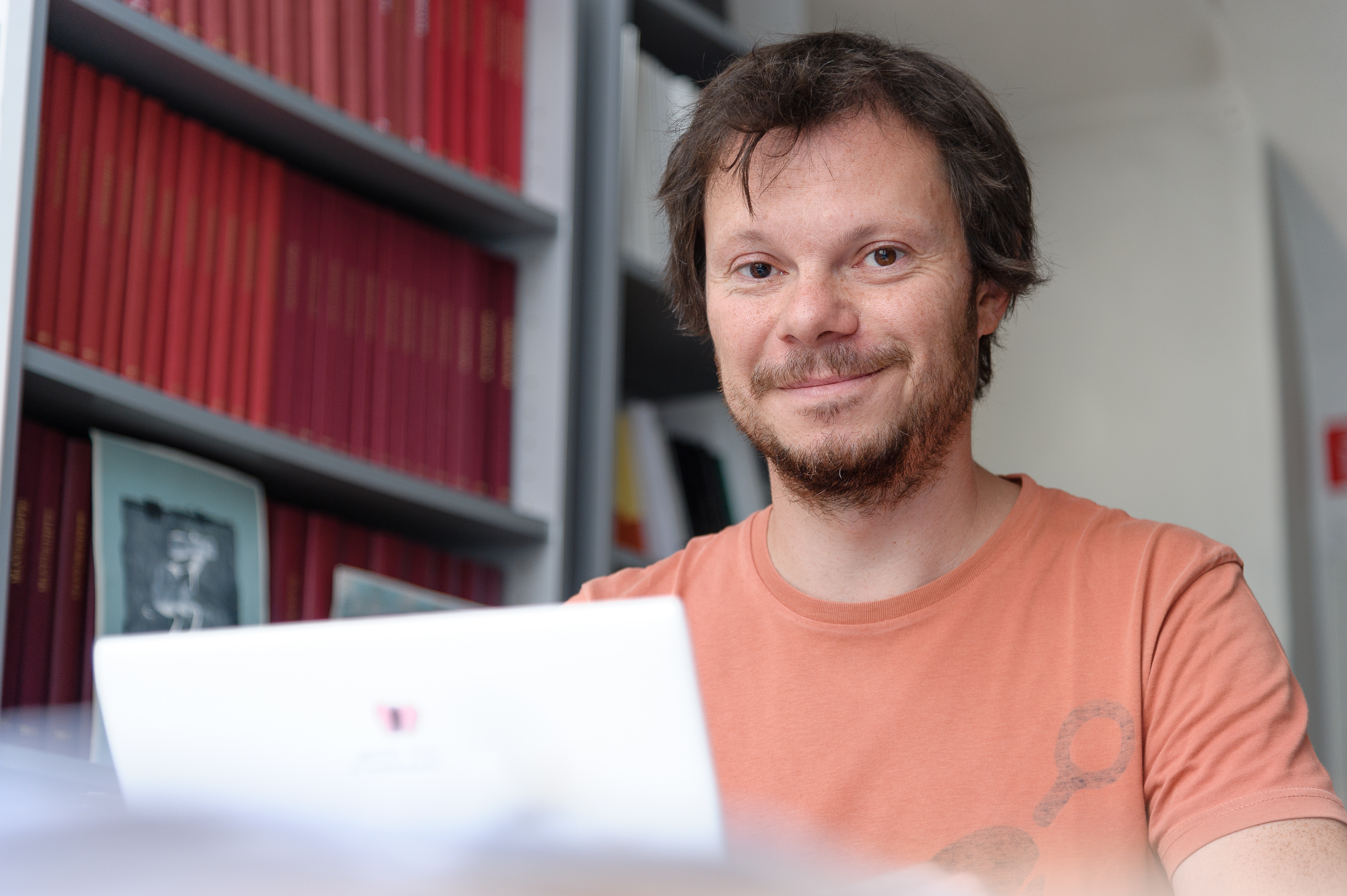 Andreas Unterweger, fotografiert von Nikolaus Lackner im Jahr 2016 in der Redaktion der Literaturzeitschrift manuskripte in Graz.